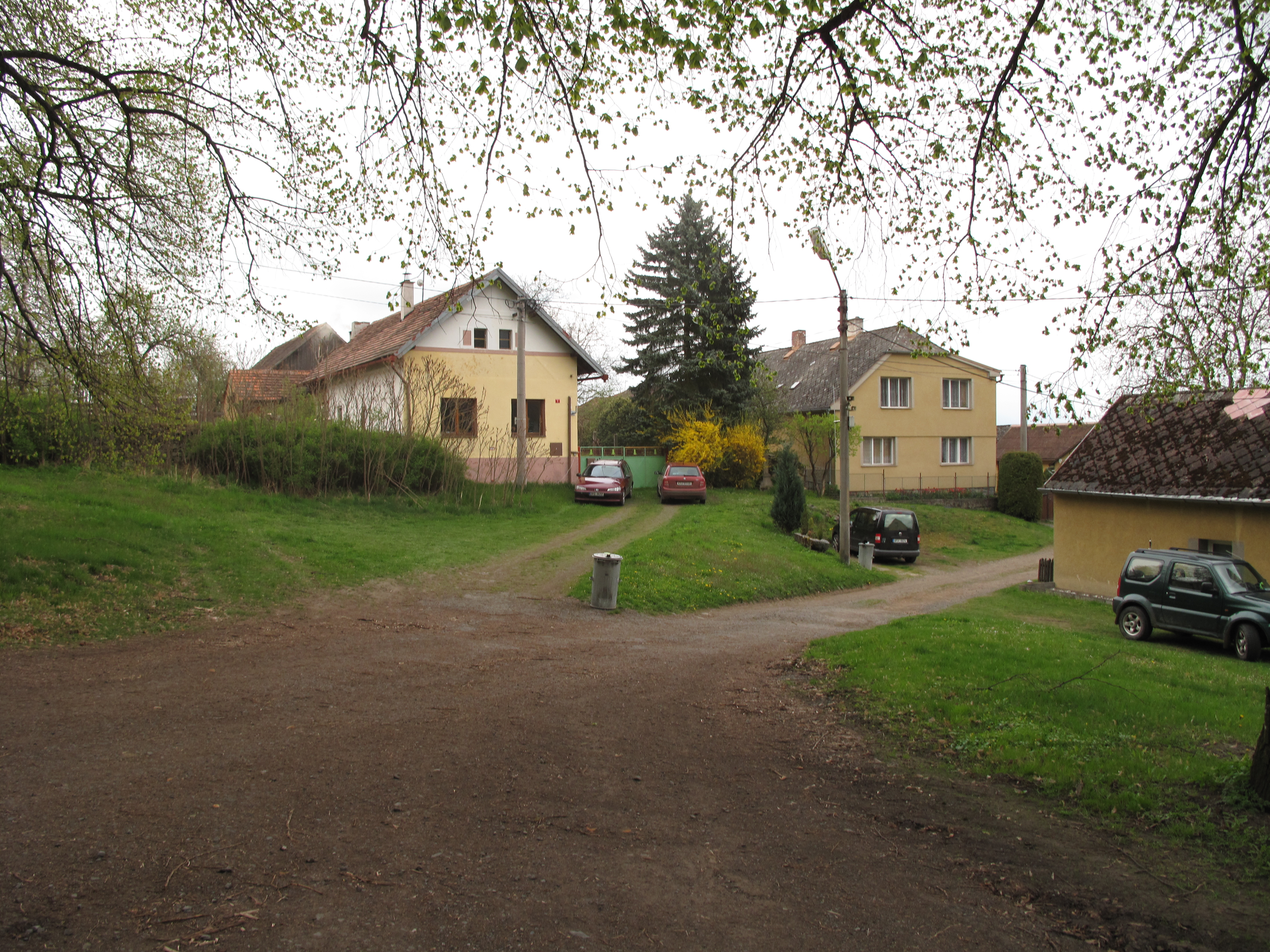 Bezpravovice. Okres Klatovy, Česká republika.